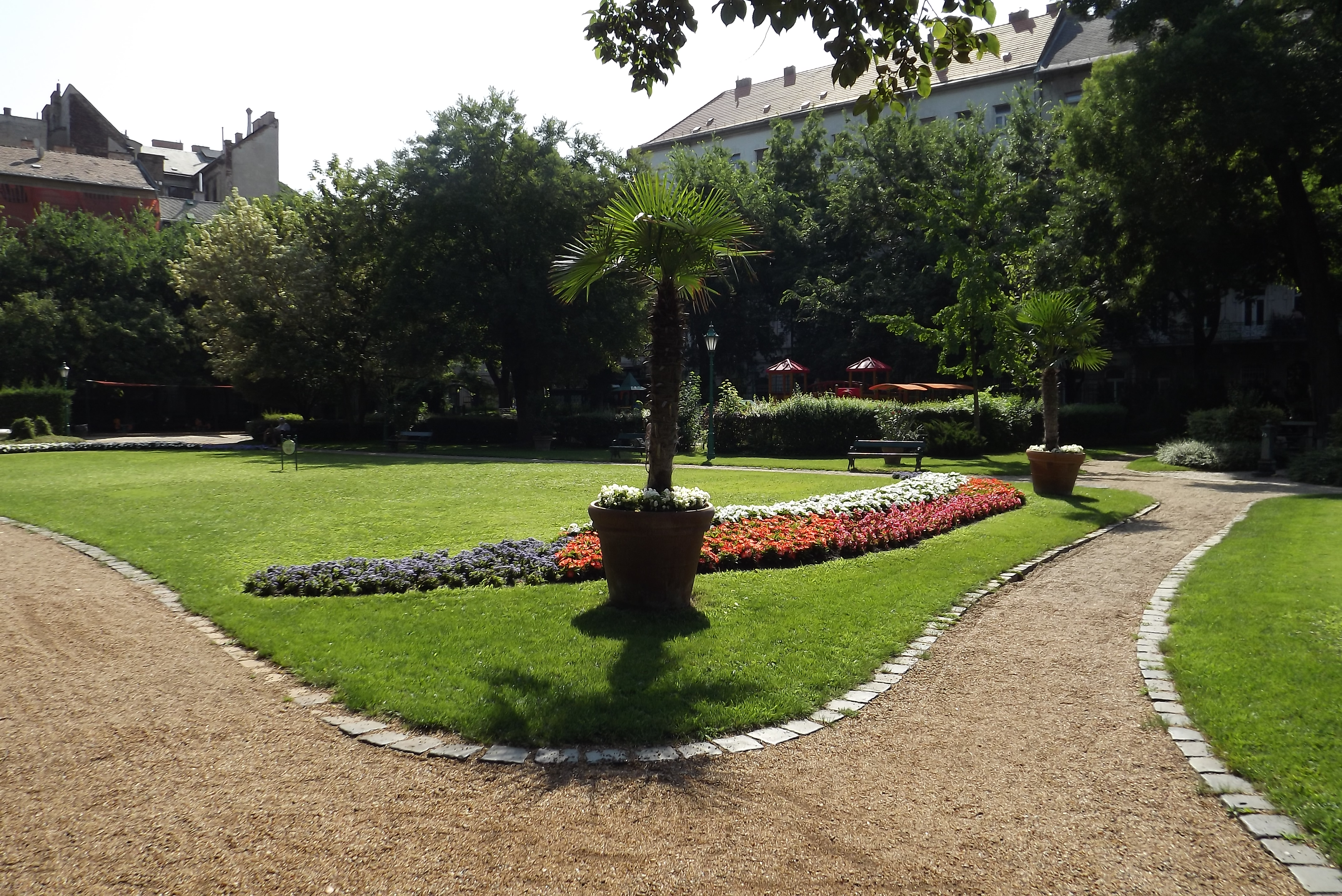 A budapesti Károlyi-kert 2014 augusztusában (Budapest, V. ker.)